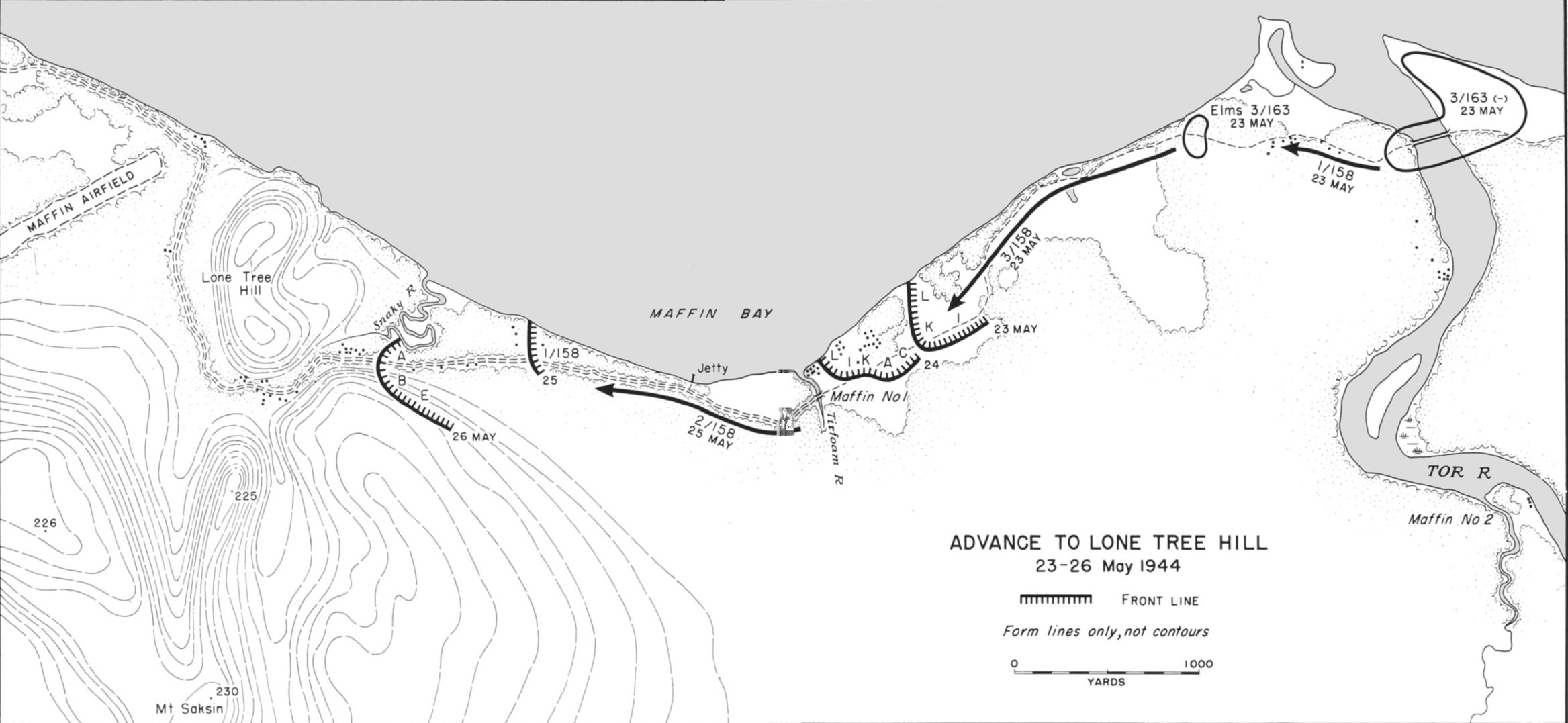 Localisation de Lone Tree Hill